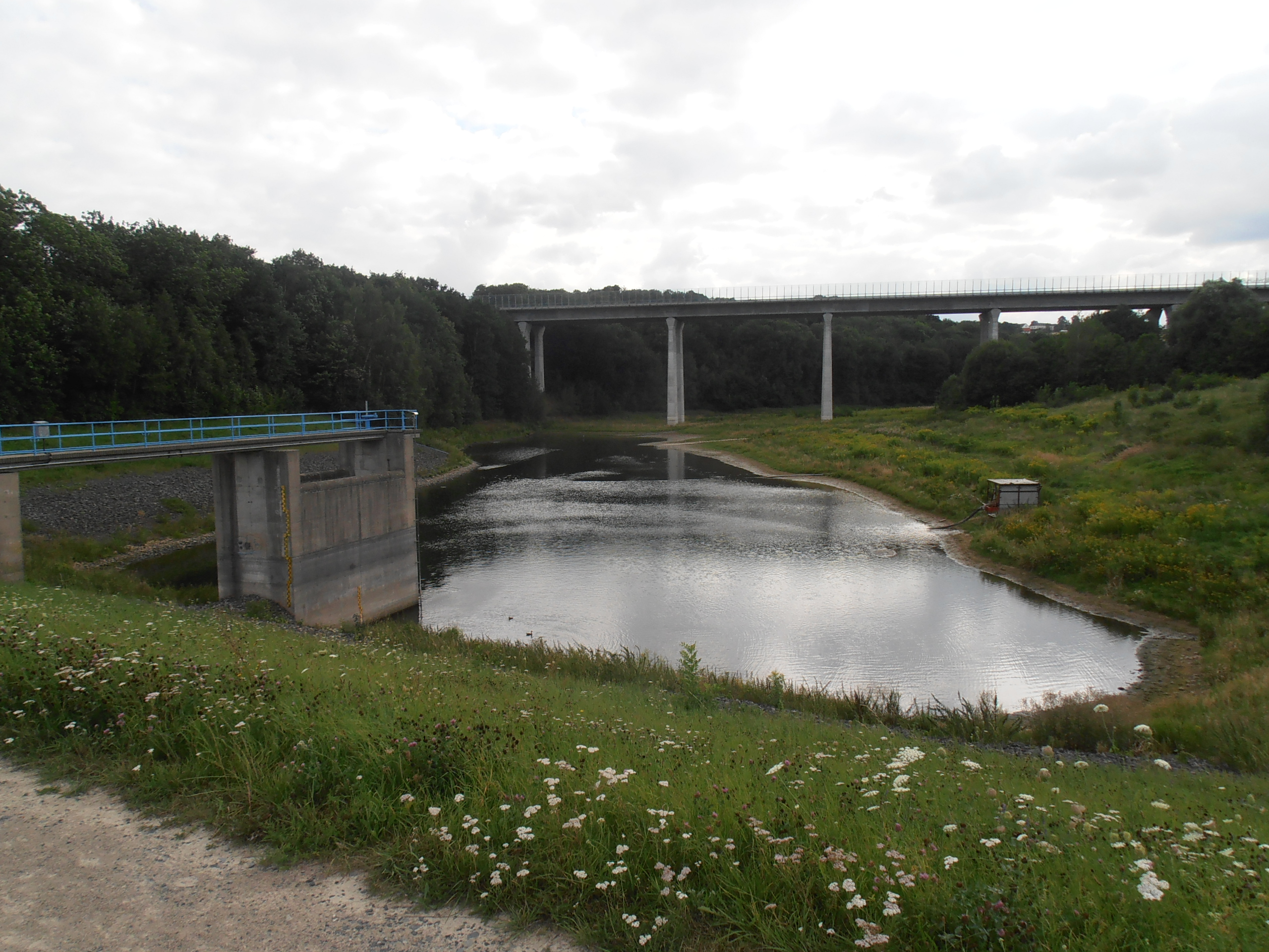 Talsperre Kauscha, auf der Krone, Blickrichtung S